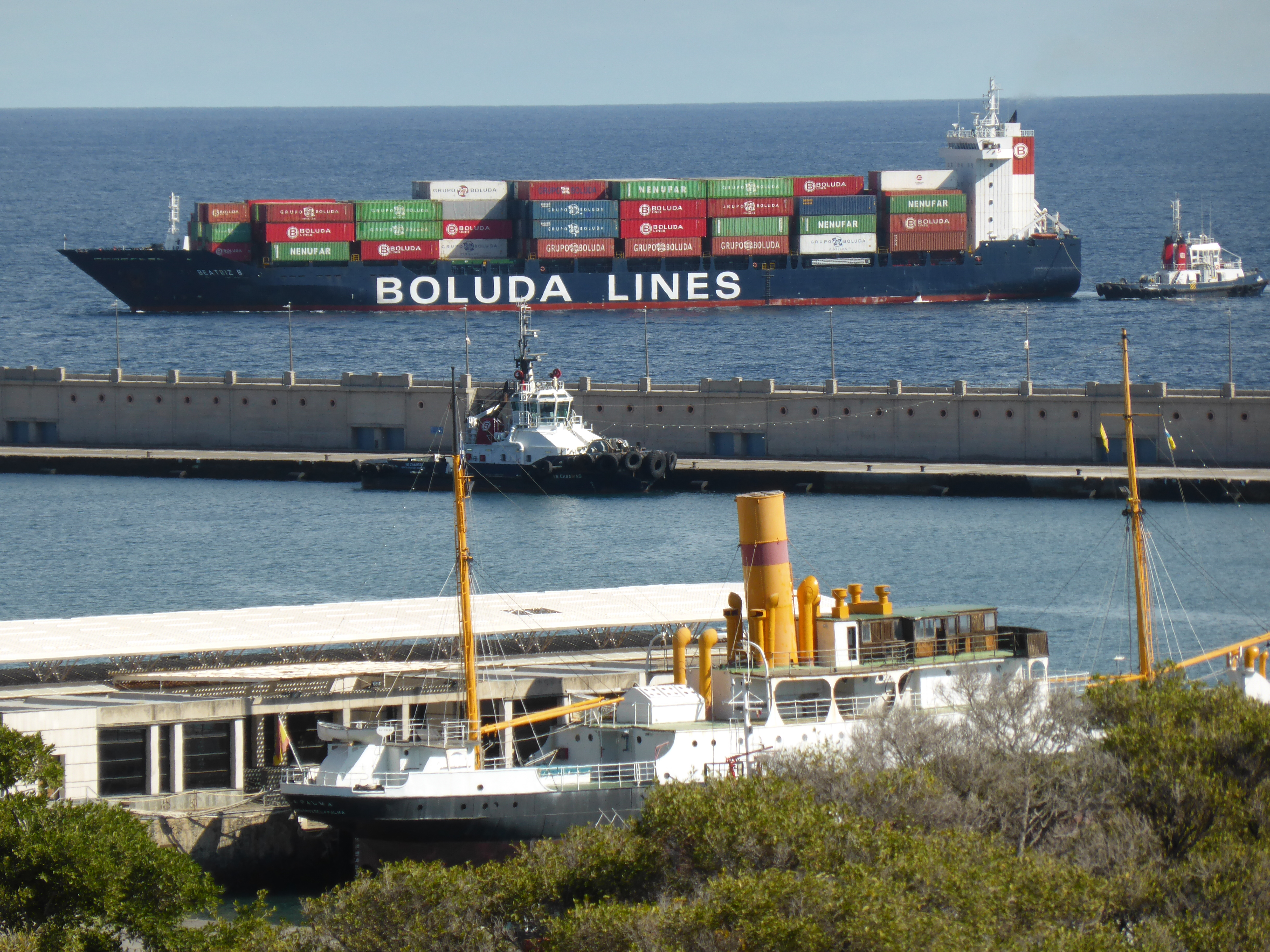 Navegando hacia la bocana del puerto se divisa el buque portacontenedores "BEATRIZ B" (IMO: 9348637), construido en 2007, matriculado en Madeira, con bandera de Portugal, de la naviera "Boluda Lines". En primer término vemos el "correíllo" "La Palma", buque de vapor del año 1912, atracado permanentemente en el Muelle Norte, que antiguamente efectuaba viajes interinsulares en Canarias.